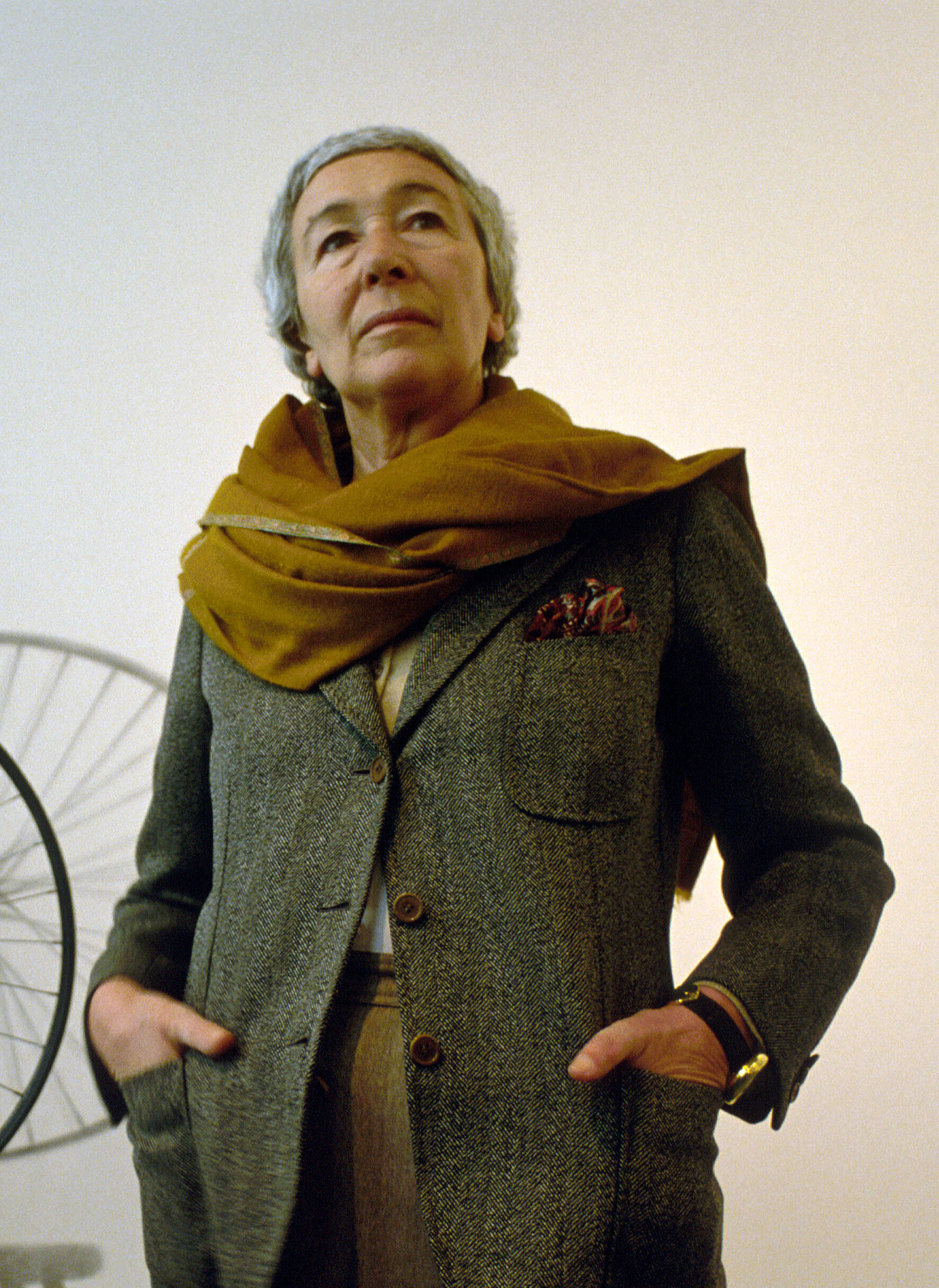 L'architetto Gae Aulenti a Palazzo Grassi di Venezia nel 1986